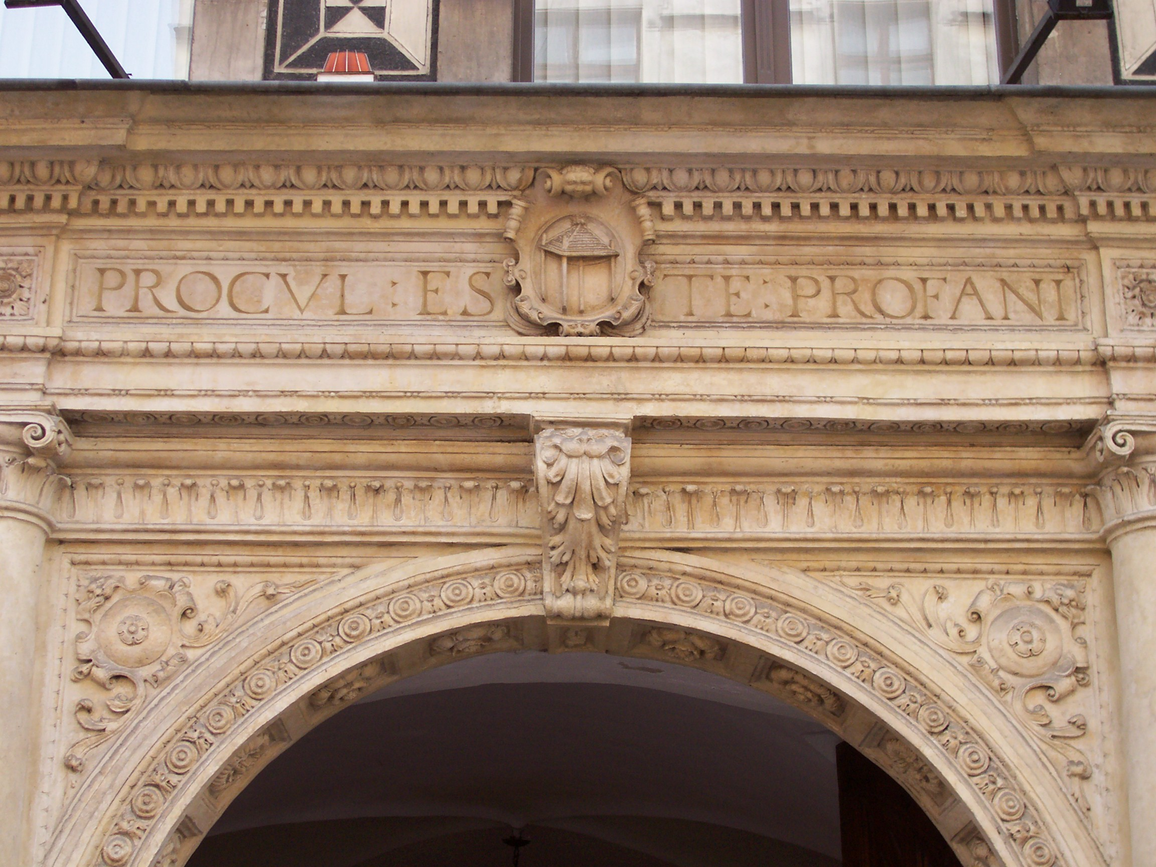 Małopolska. Kraków. Ul. Kanonicza 21. Kamienica Dziekańska. Fragment portalu.